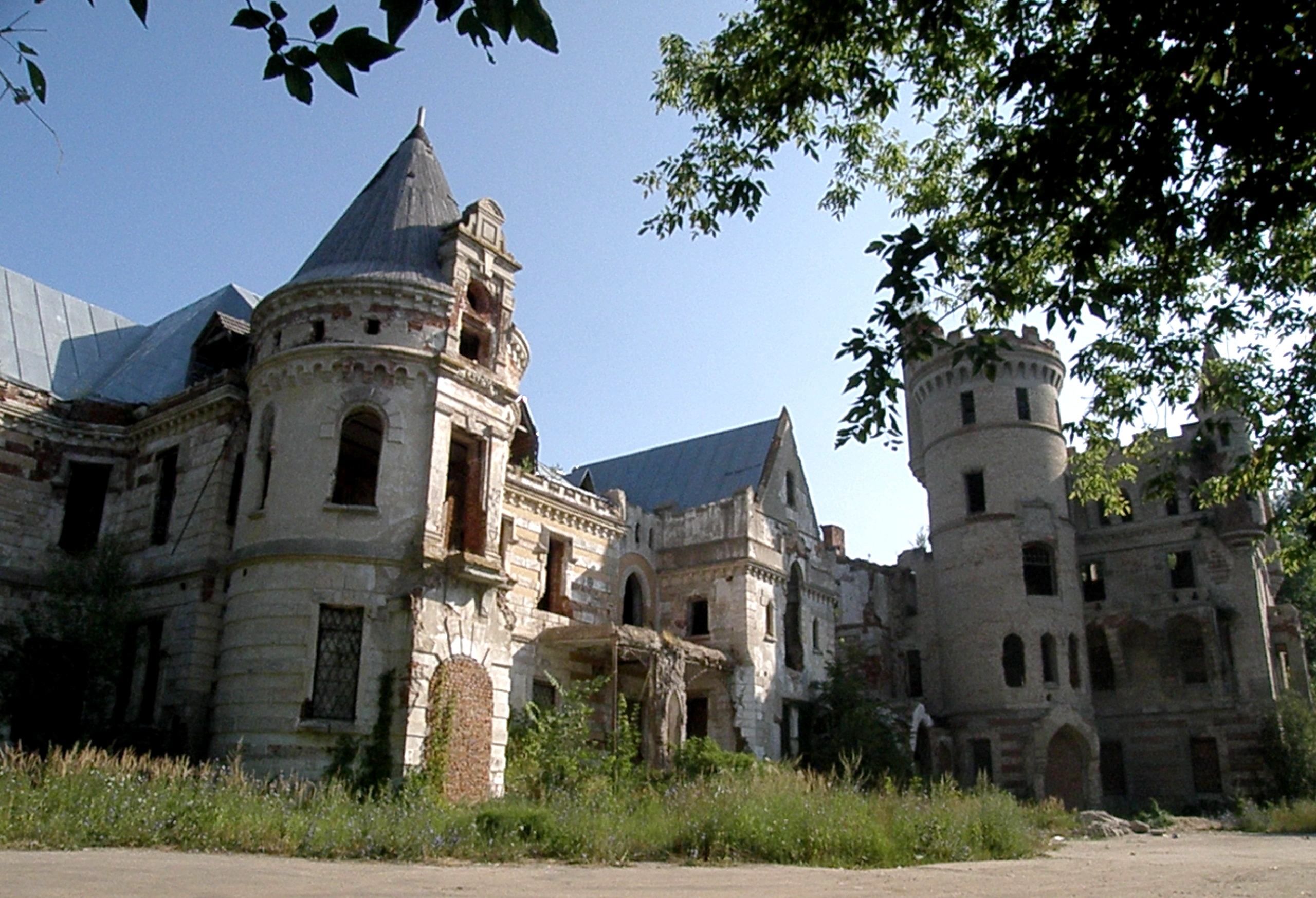 Пос. Муромцево, Владимирская обл.